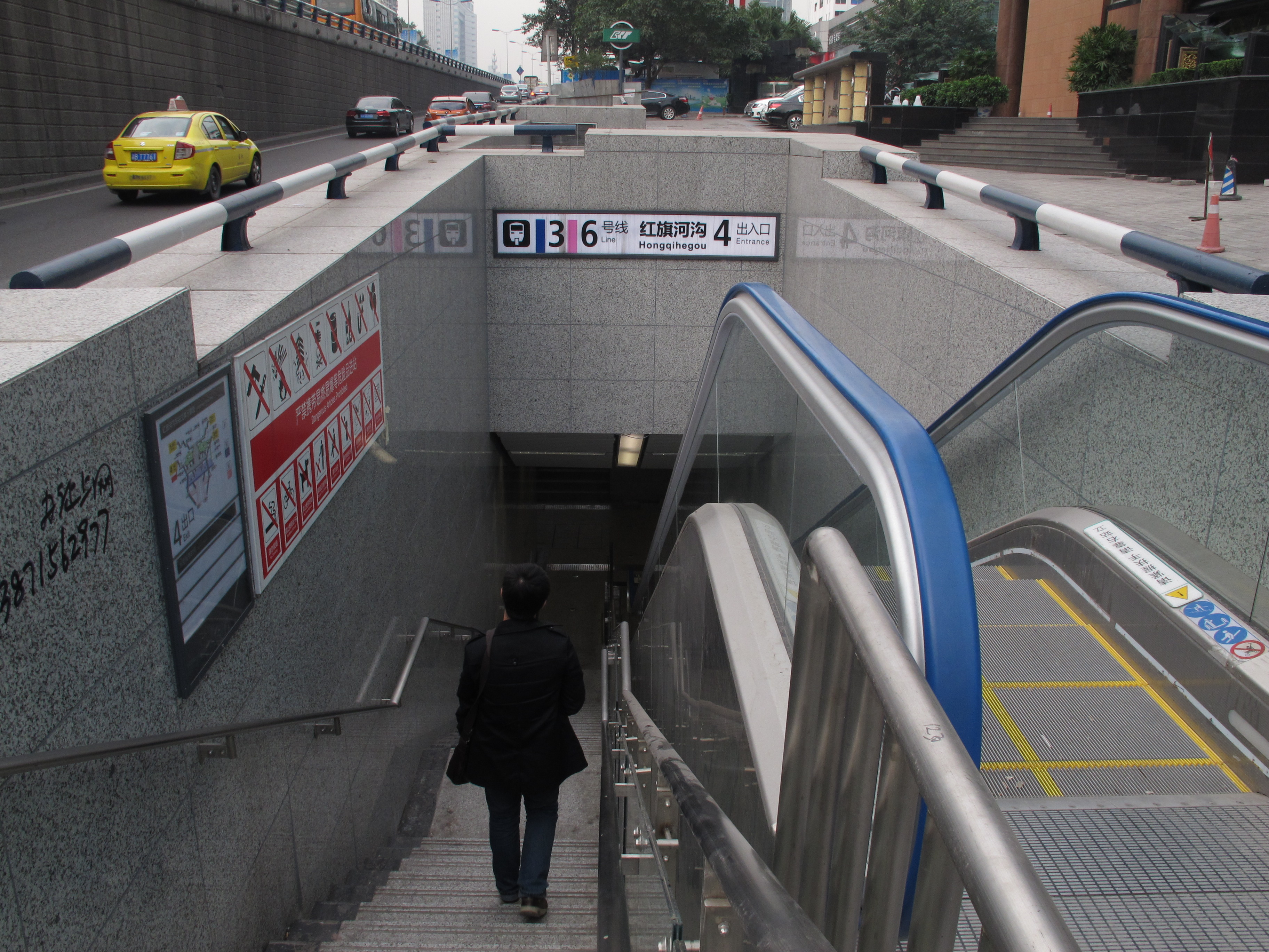 重庆轨道交通 红旗河沟站，作为三号线与六号线的换乘站